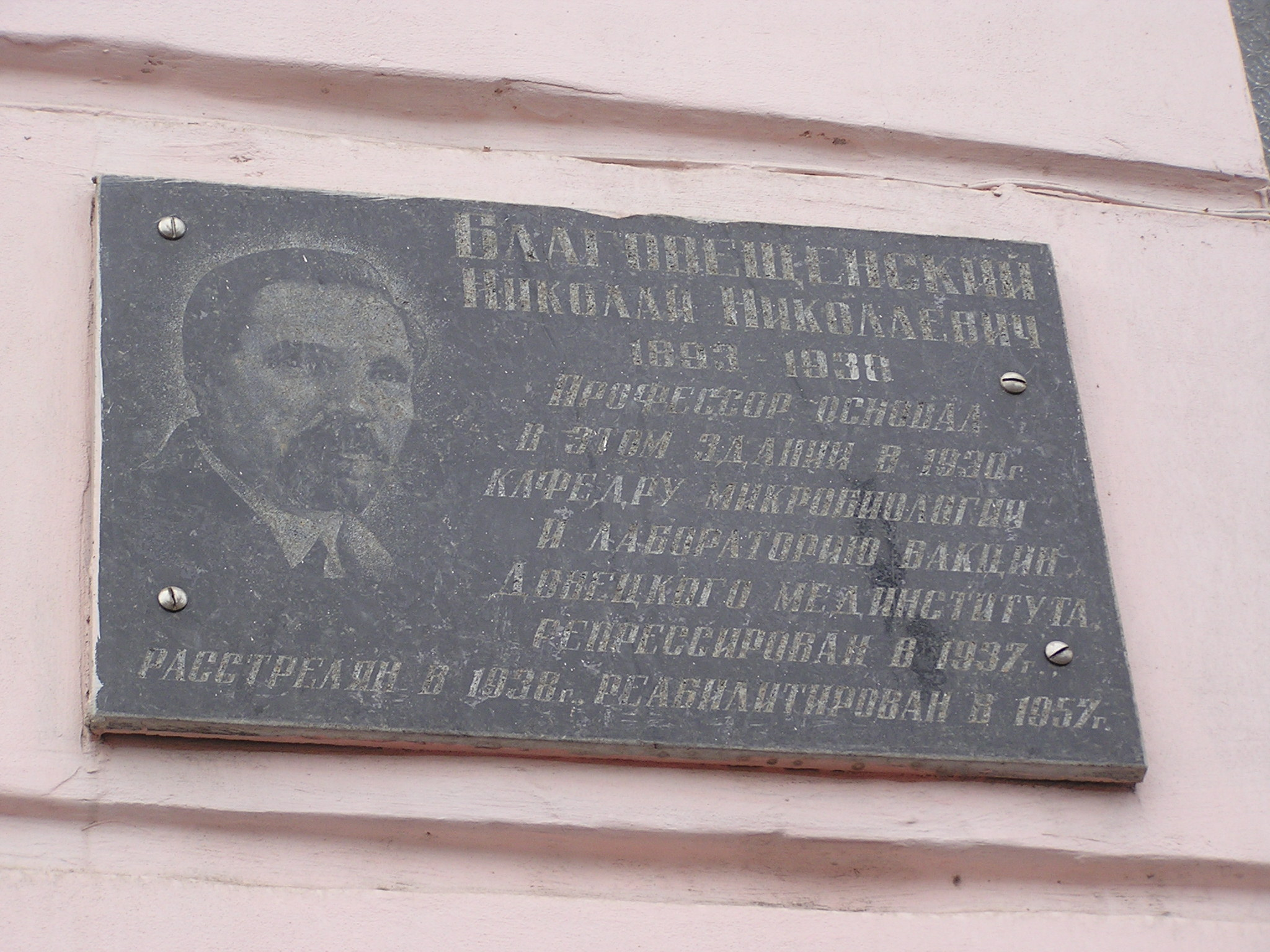 мемориальная табличка в Донецке